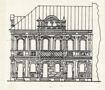 Беларуская (тарашкевіца): Менск (Miensk), рог вуліц Зборавай (vulica Zboravaja) і Фэліцыянаўскай (vulica Felicyjanaŭskaja). Дом Мачыза